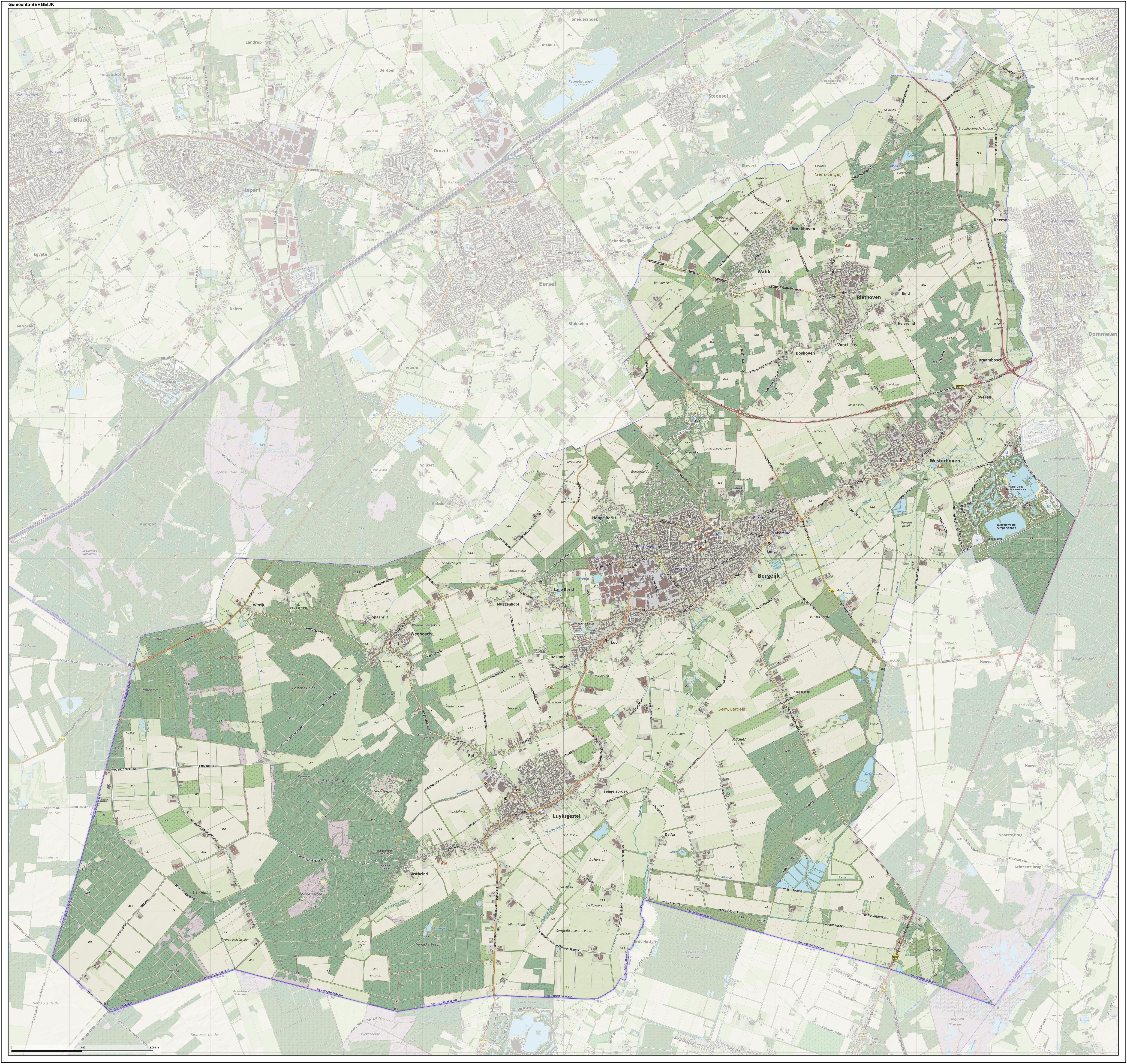 Topografische gemeentekaart. Resolutie: 400 pixels/km. Kaartbeeld samengesteld uit de open geodata van de Top10NL en Top25namen (Kadaster), Creative Commons-BY licentie. Gebouwvlakken uit open geodata BAG extract. Wegen uit de OpenStreetMap, OpenStreetMap community. Reliëfschaduw uit de Actuele Hoogtekaart AHN2. Samenstelling en kleurenschema: Jan-Willem van Aalst, met QGIS. Zie ook de Legenda.